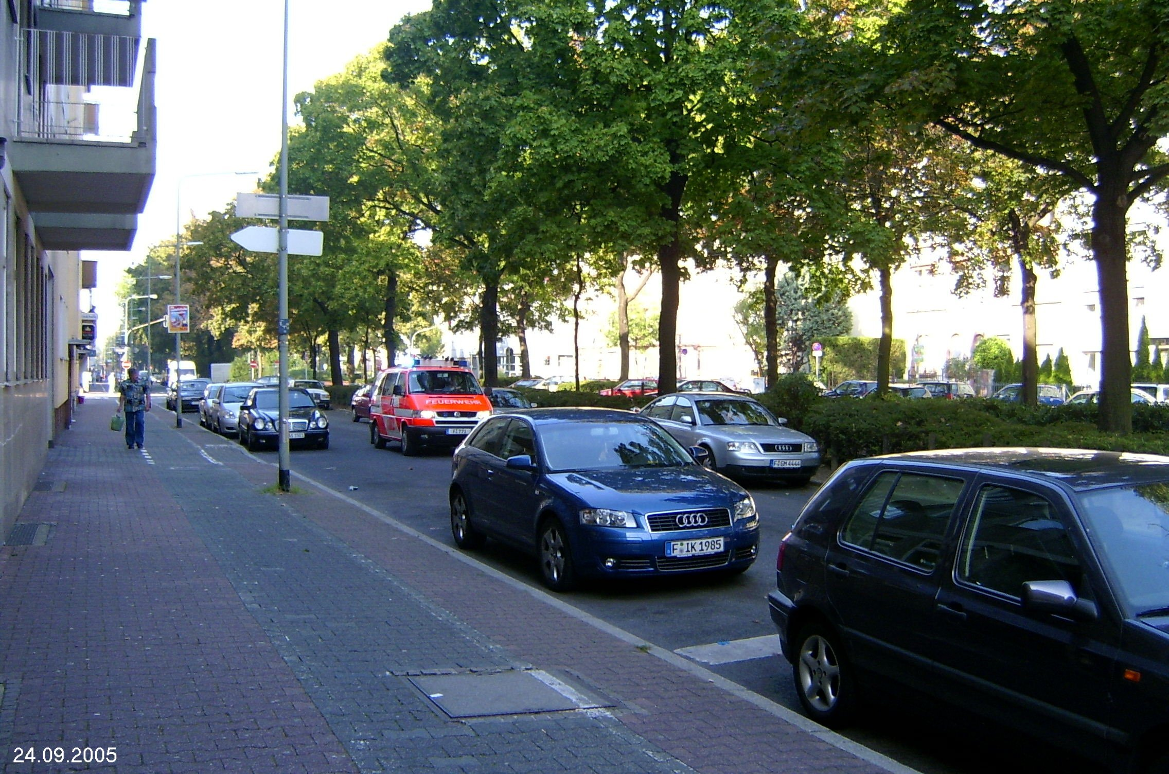 Die Frankenallee in Frankfurt am Main (Gallusviertel), Höhe Kostheimer Straße, Blickrichtung Westen